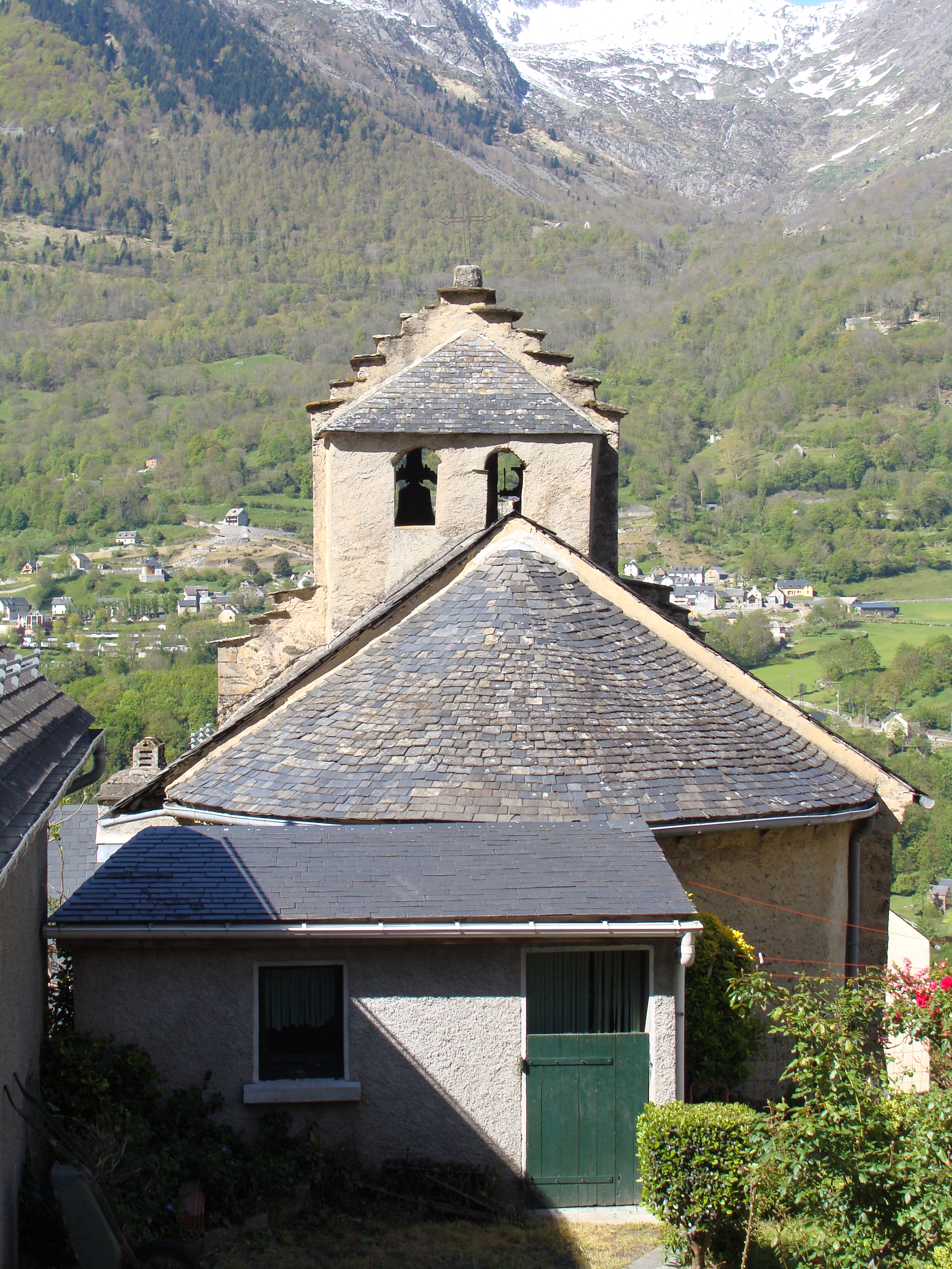 Vizos - Eglise